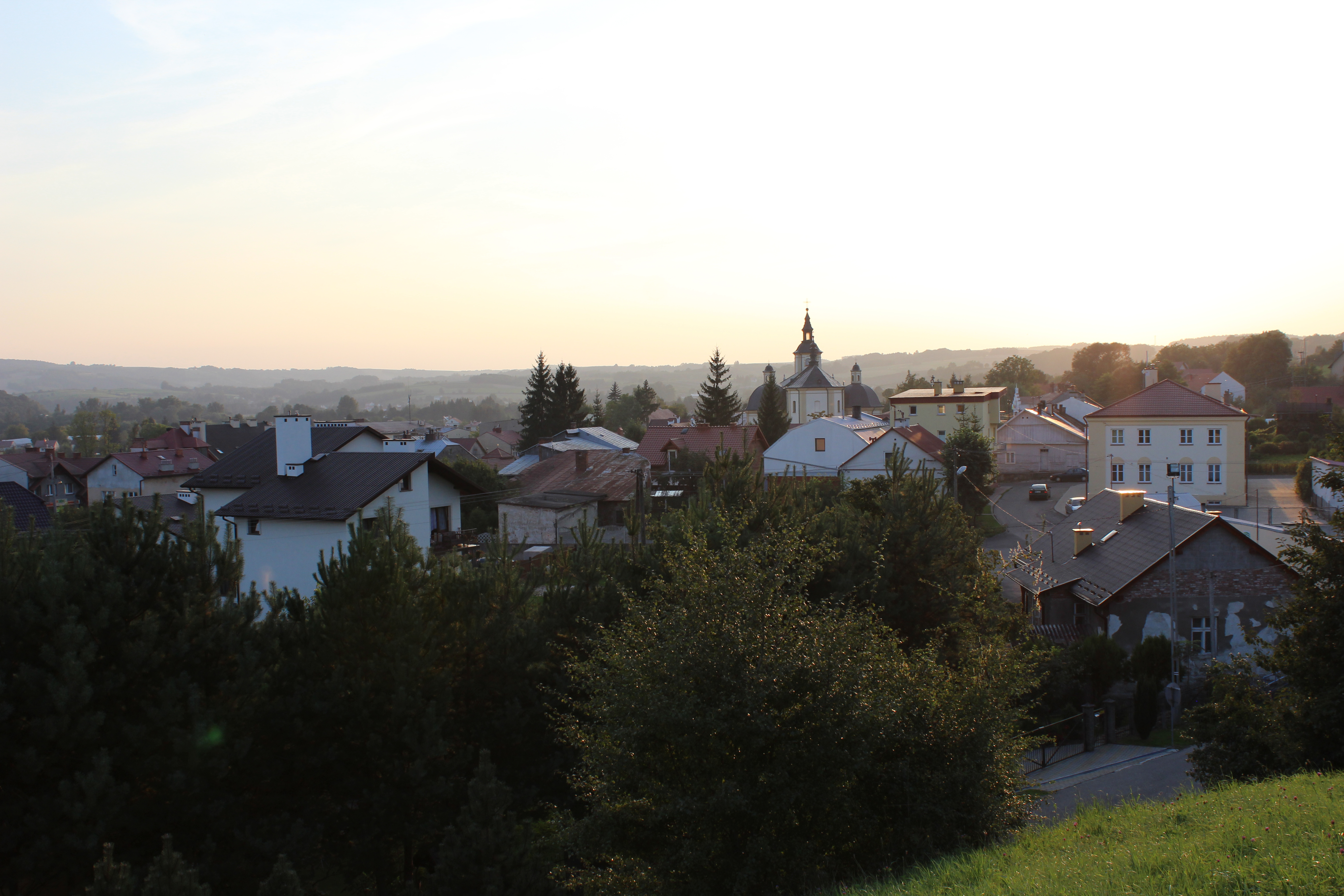 Czudec, Poland